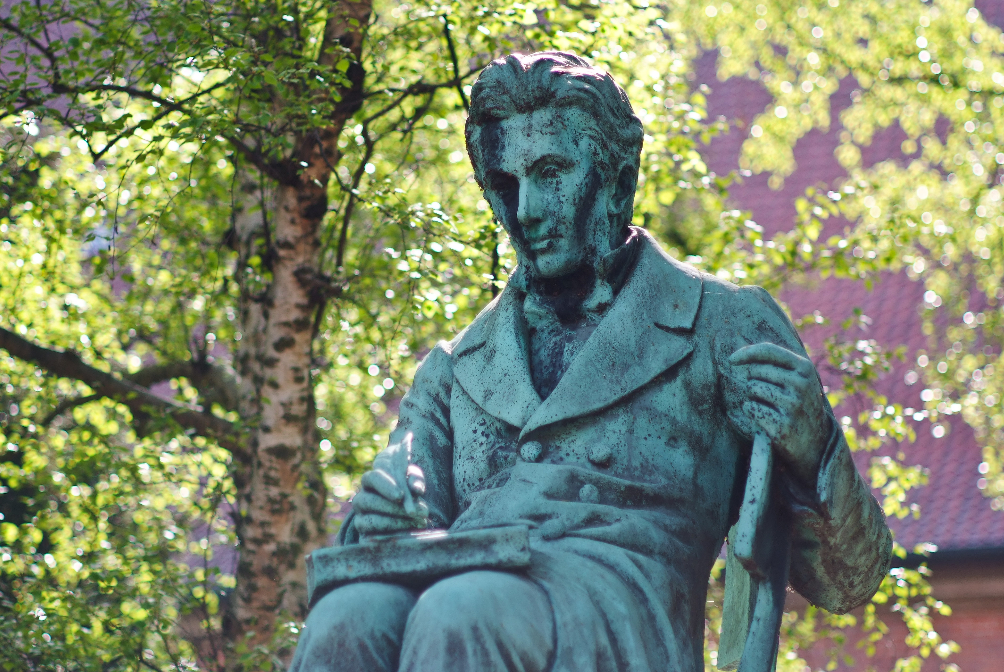 Søren Kierkegaard, Danish philosopher